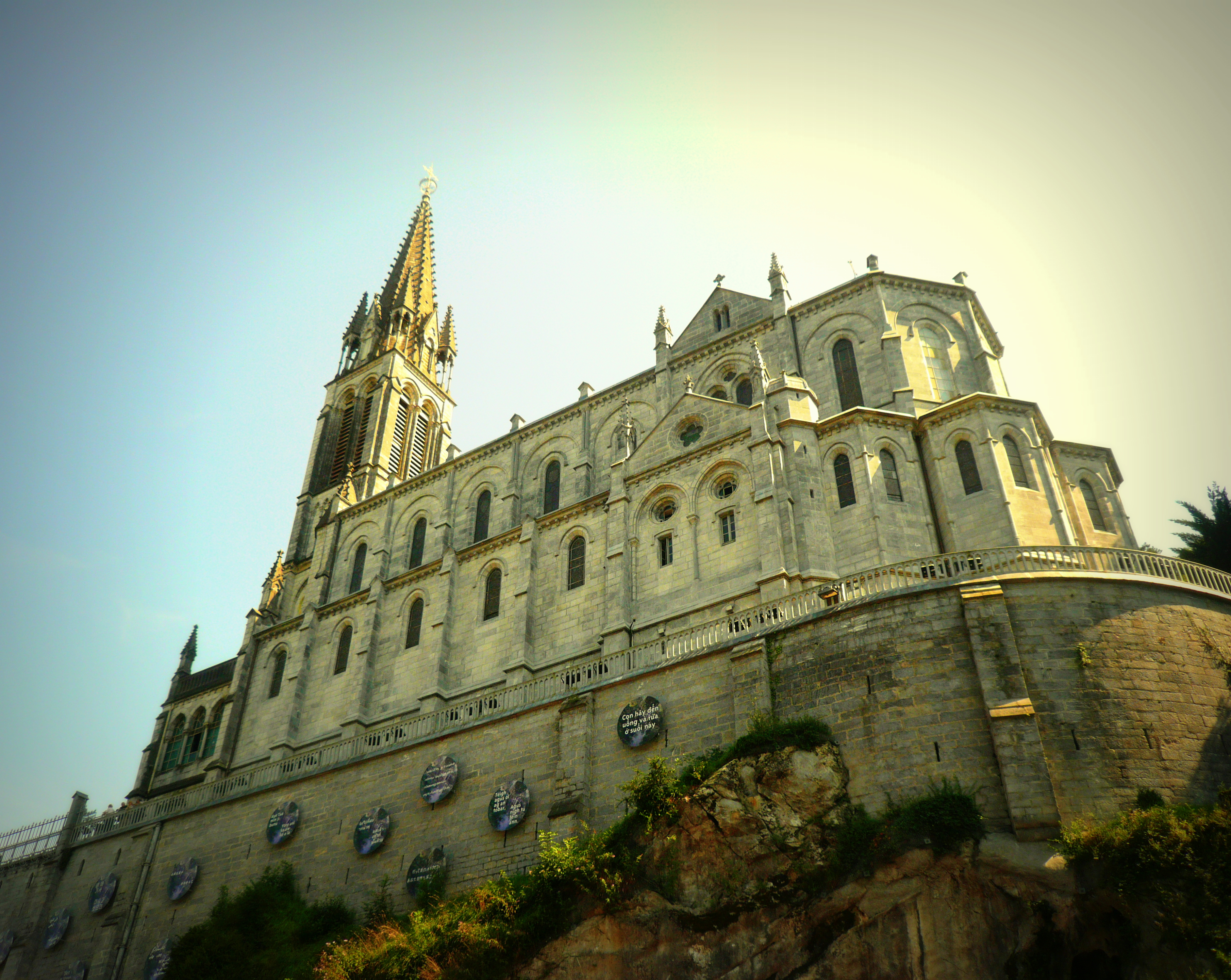 Boulevard de la Grotte .